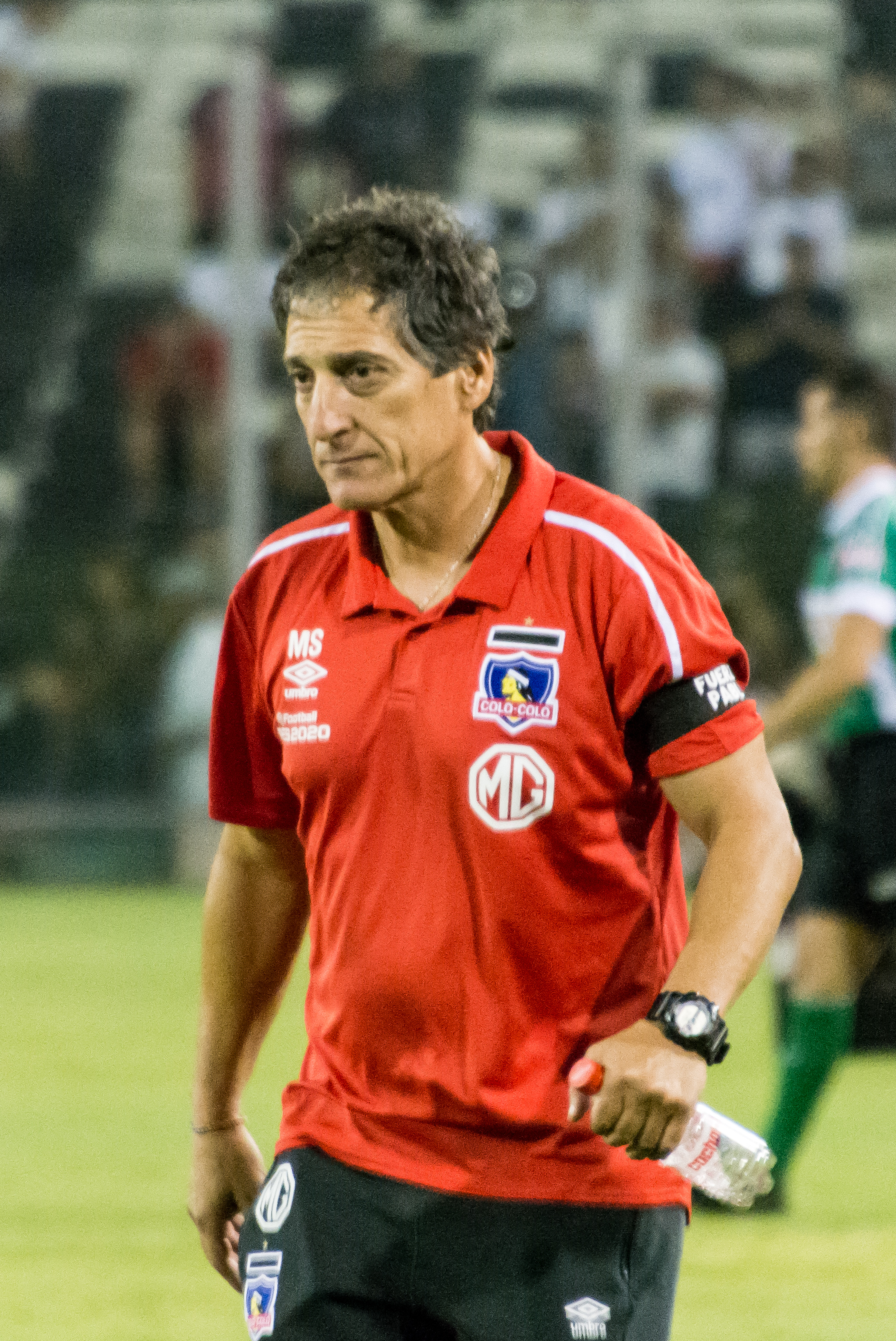 Colo-Colo v Palestino, Estadio Monumental, Macul, Santiago, Región Metropolitana, Chile